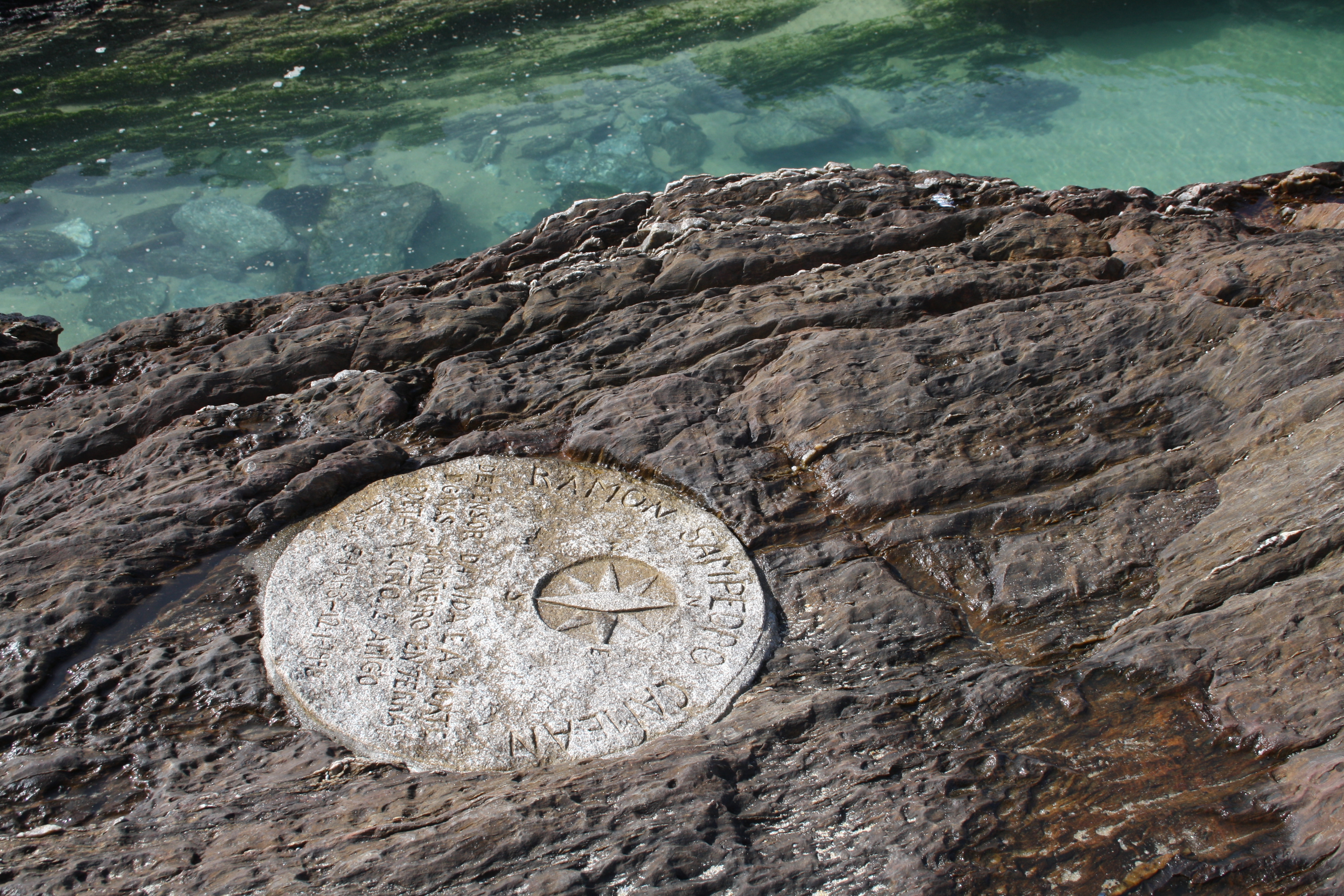 Placa homenaje a Ramón Sampedro en la playa de As Furnas, en el lugar donde se lanzó al agua causándose la lesión que lo dejó tetrapléjico. En la misma reza: "Ramón Sampedro Camean, defensor da vida e a morte dignas, mariñeiro en terra, poeta, veciño e amigo." En castellano: "Ramón Sampedro Camean, defensor de la vida y la muerte dignas, marinero en tierra, poeta, vecino y amigo."